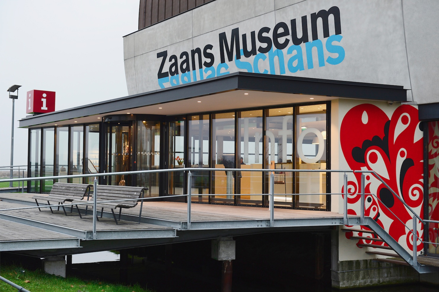 Zaans Museum - Entree